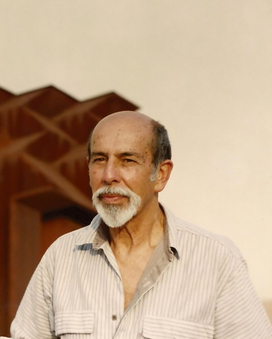 Herminio Barrera y Eduardo Ramírez Villamizar, Museo de Arte Moderno de Bucaramanga, Foto de Nicolás Zea Posada.